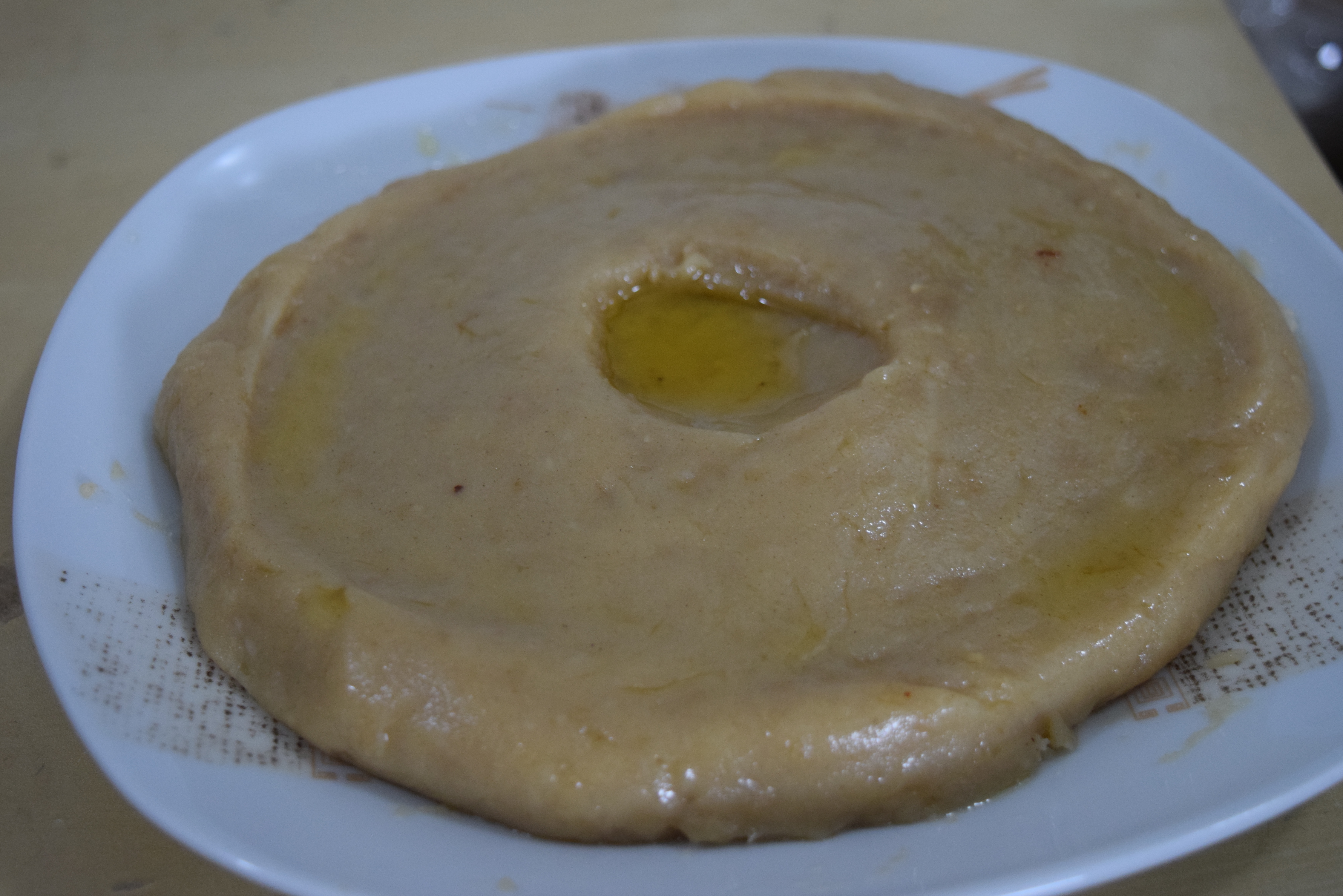 طبق من العصيدة المُعدّة من السّكّر في القطيف، كما يظهر لونها جليّاً.